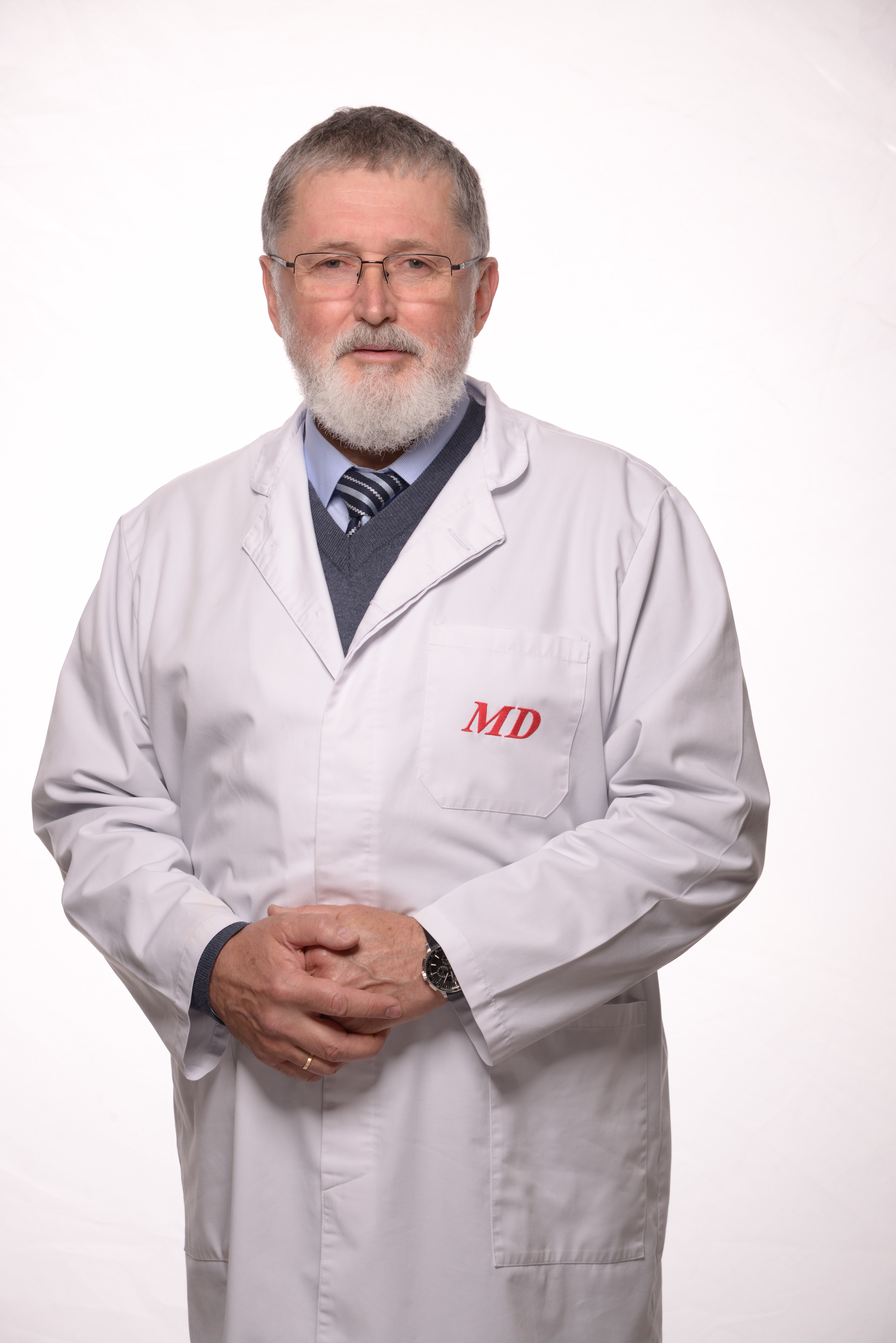 доктор медичних наук, професор кафедри неврології та реабілітаційної медицини Національного медичного університету ім. академіка О.О.Богомольця (до 2017 р), засновник першої в Україні клініки вертероневрологіі і Українського інституту м'язово-скелетної медицини та неврології, лікувально-діагностичного центру «Меддіагностика».